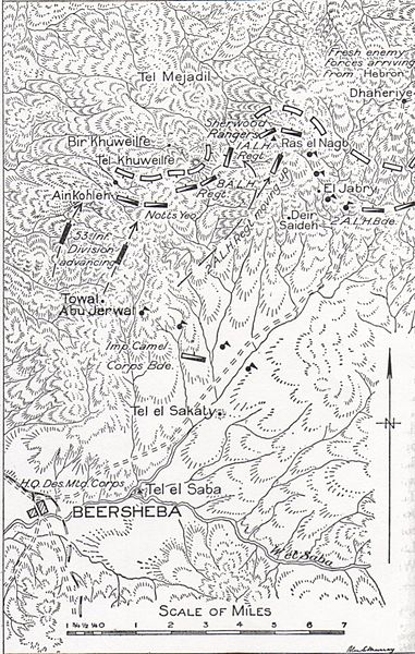 הערכות הכוחות הבריטים מול תל חווילפה 2-3 נוב 1917